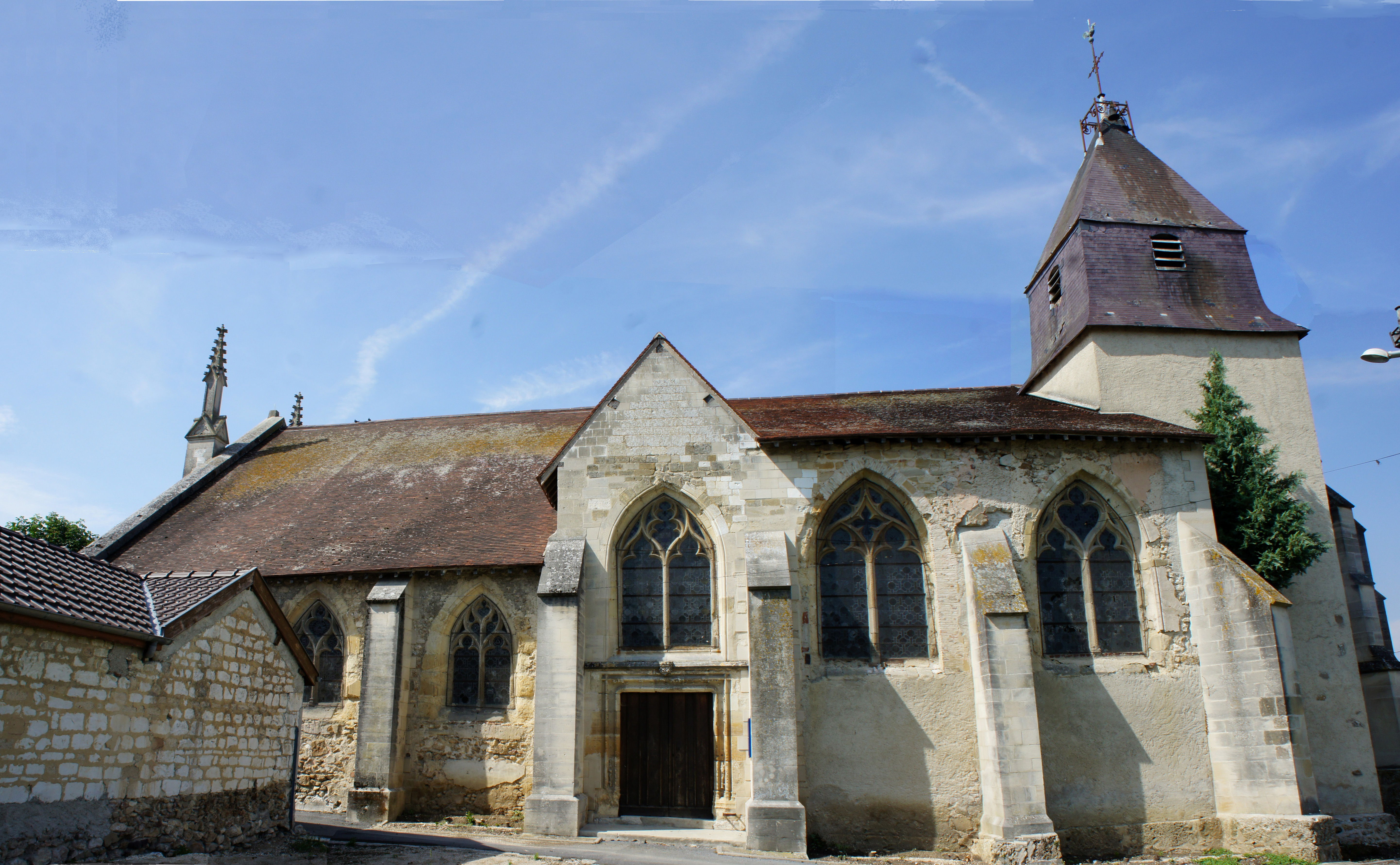 Vue du portail sud .